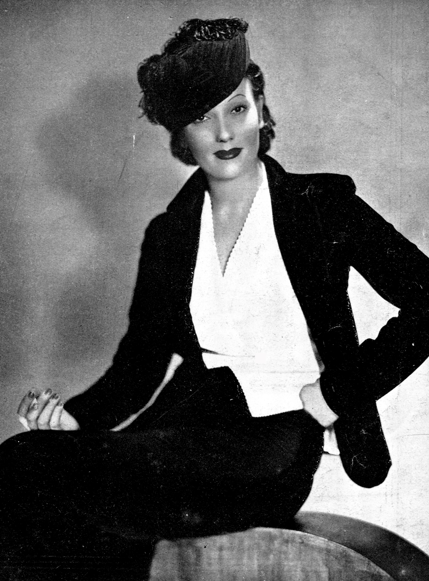 Isa Miranda in Una donna tra due mondi - produz Astra Film Roma + Bavaria Film Monaco B - regia Goffredo Alessandrini + Arthur Rabenhalt - 1936